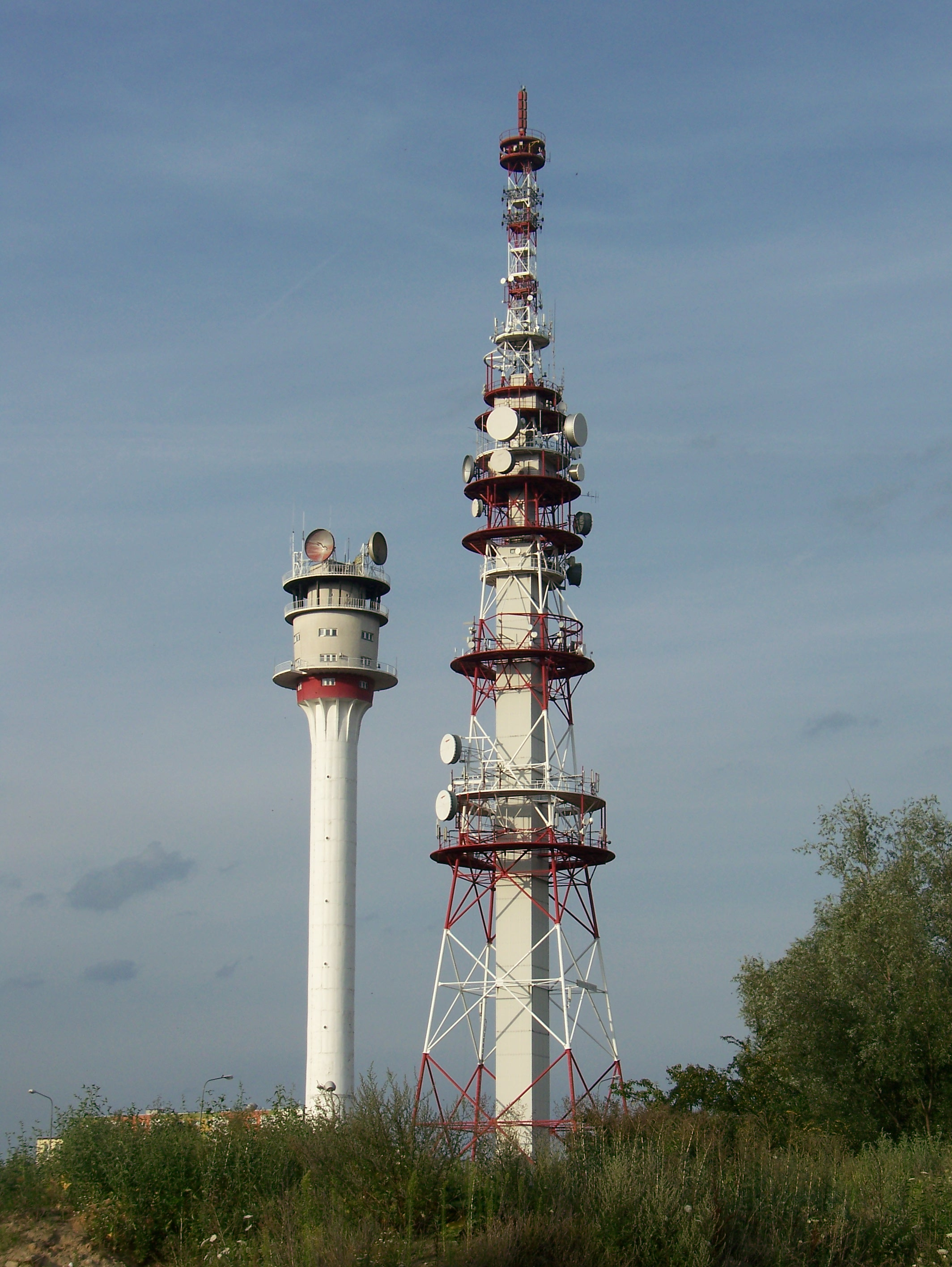 Wieże RTV na Piątkowie. Widok z ulicy Hulewiczów.